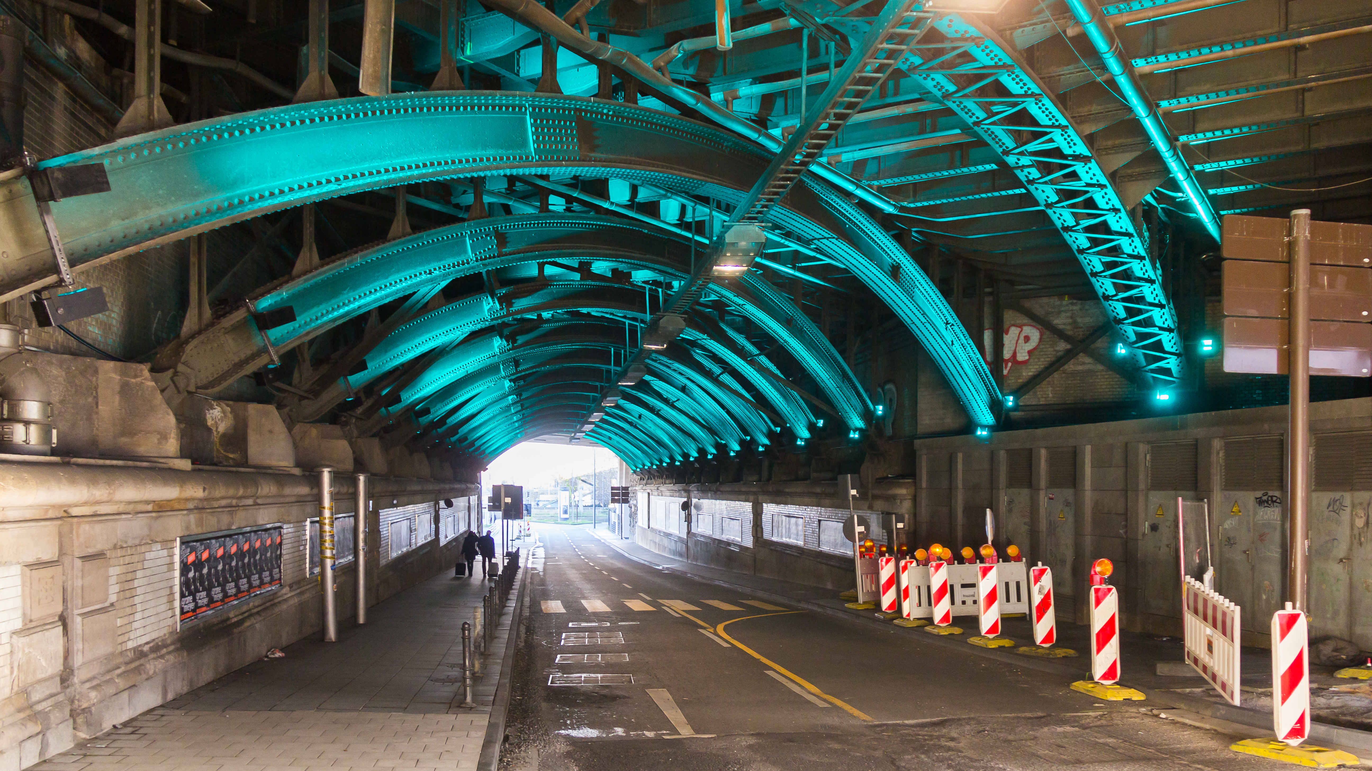 Trankgasse Köln - Beleuchtung im Tunnel unter dem Hauptbahnhof. LED-Strahler wurden unterhalb und seitlich der Stahlbögen auf beiden Seiten platziert und so ausgerichtet, dass der Streiflichteffekt die besondere Stahlkonstruktion und die Stahlnieten betont. Die gewählte Lichtfarbe ist Türkis und knüpft in ihrer Wirkung an das Kölner Brückengrün an.